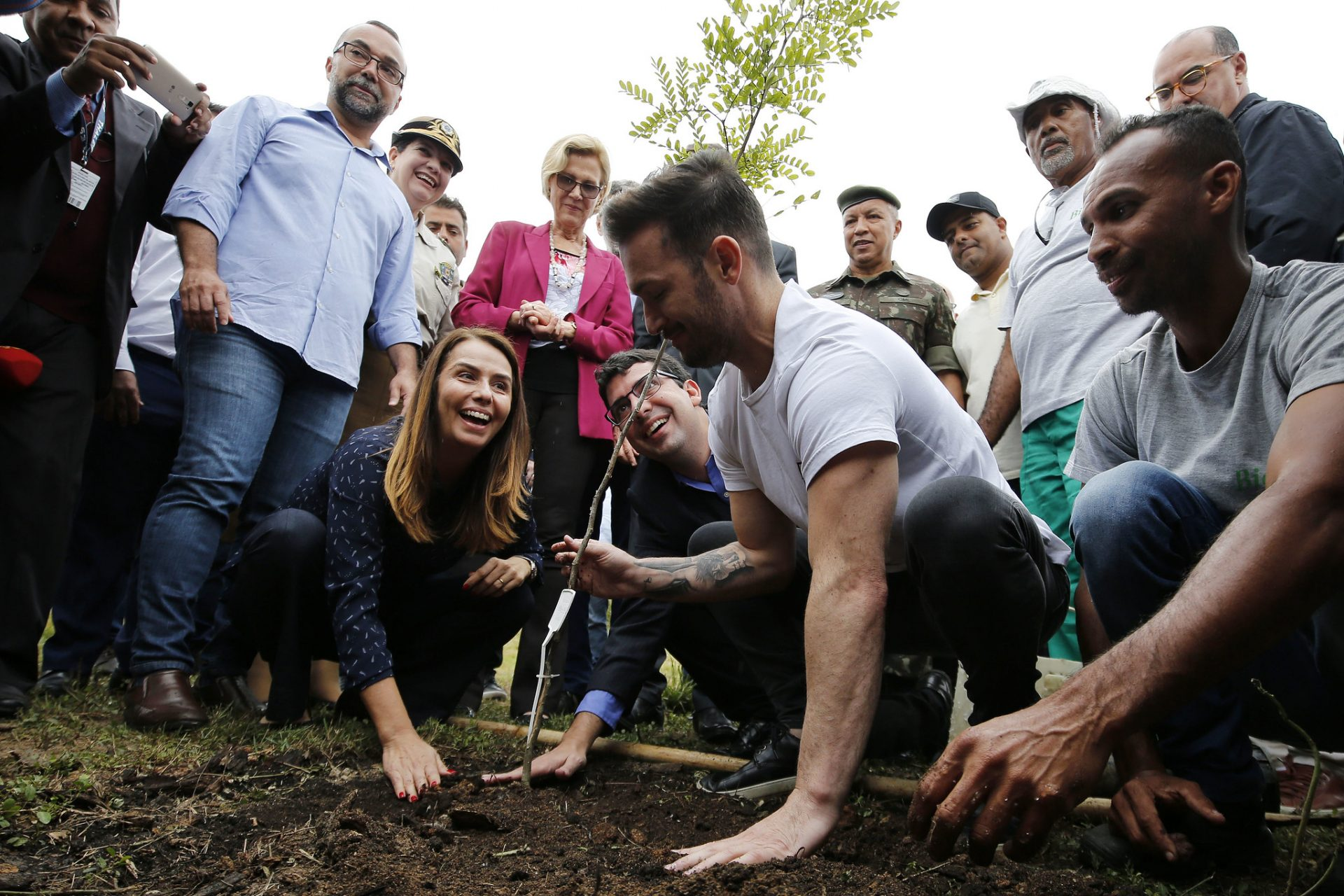 Atleta olímpico Diego Hypólito plantando uma das mudas da Floresta dos Atletas.